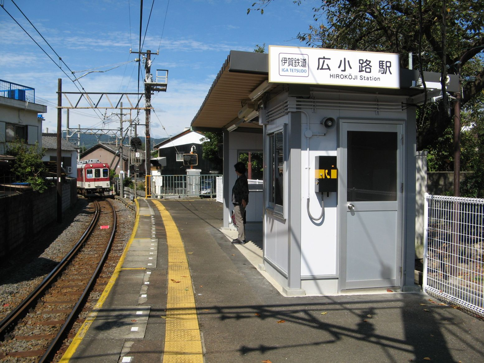 伊賀鉄道 広小路駅 駅舎